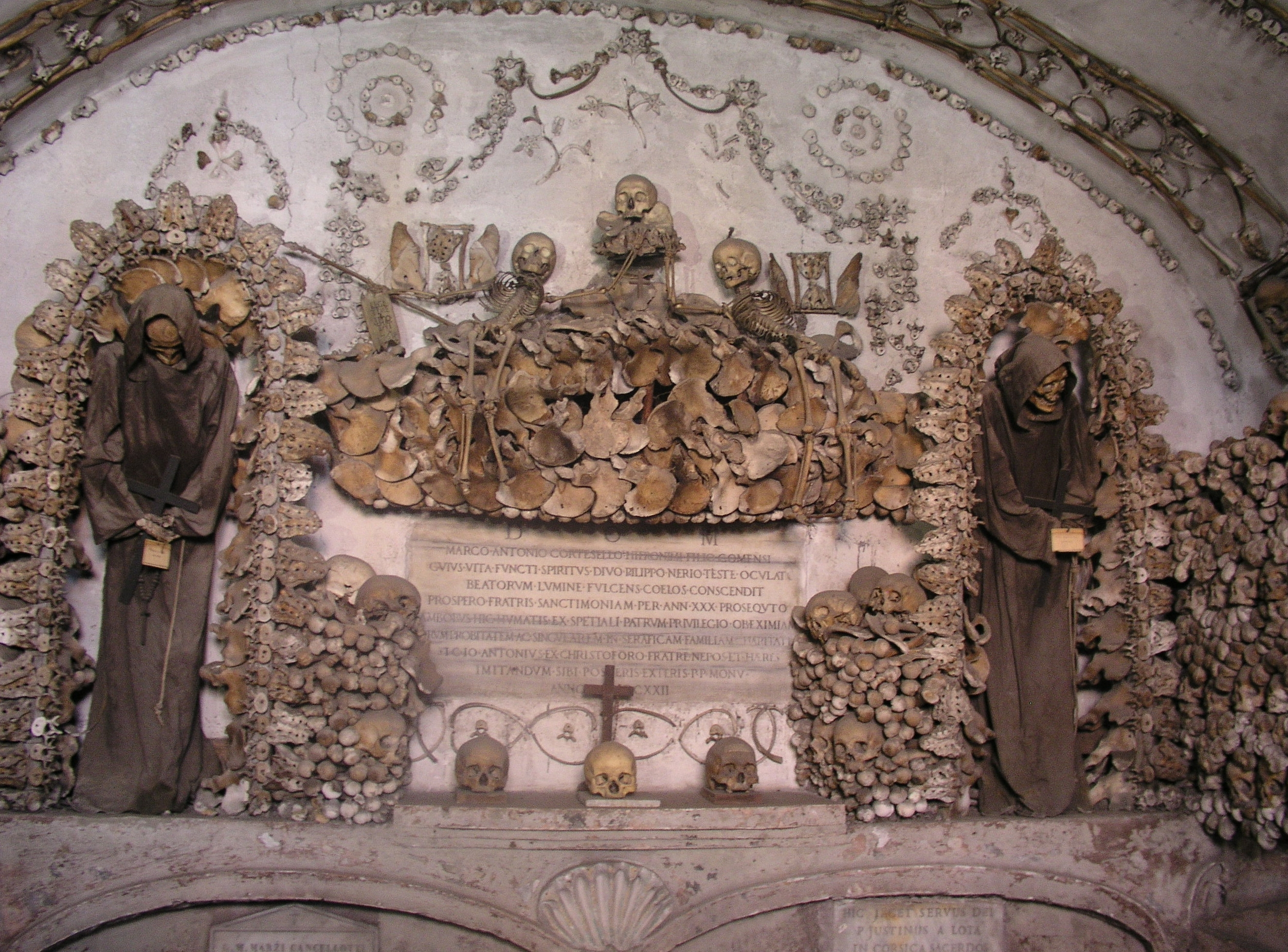 Rom, Santa Maria Immacolata a Via Veneto, Krypta der Kapuziner